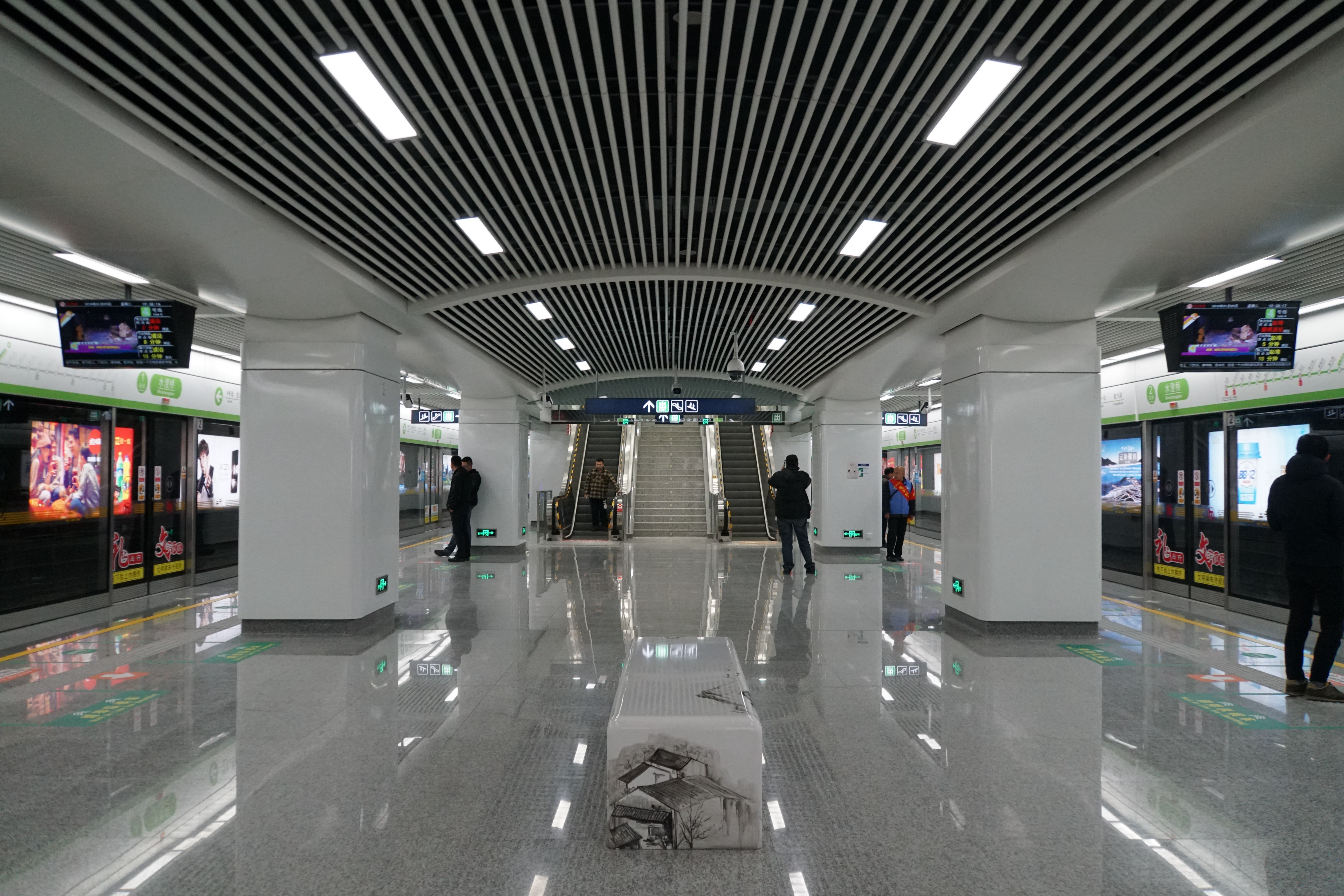 水澄桥站站台